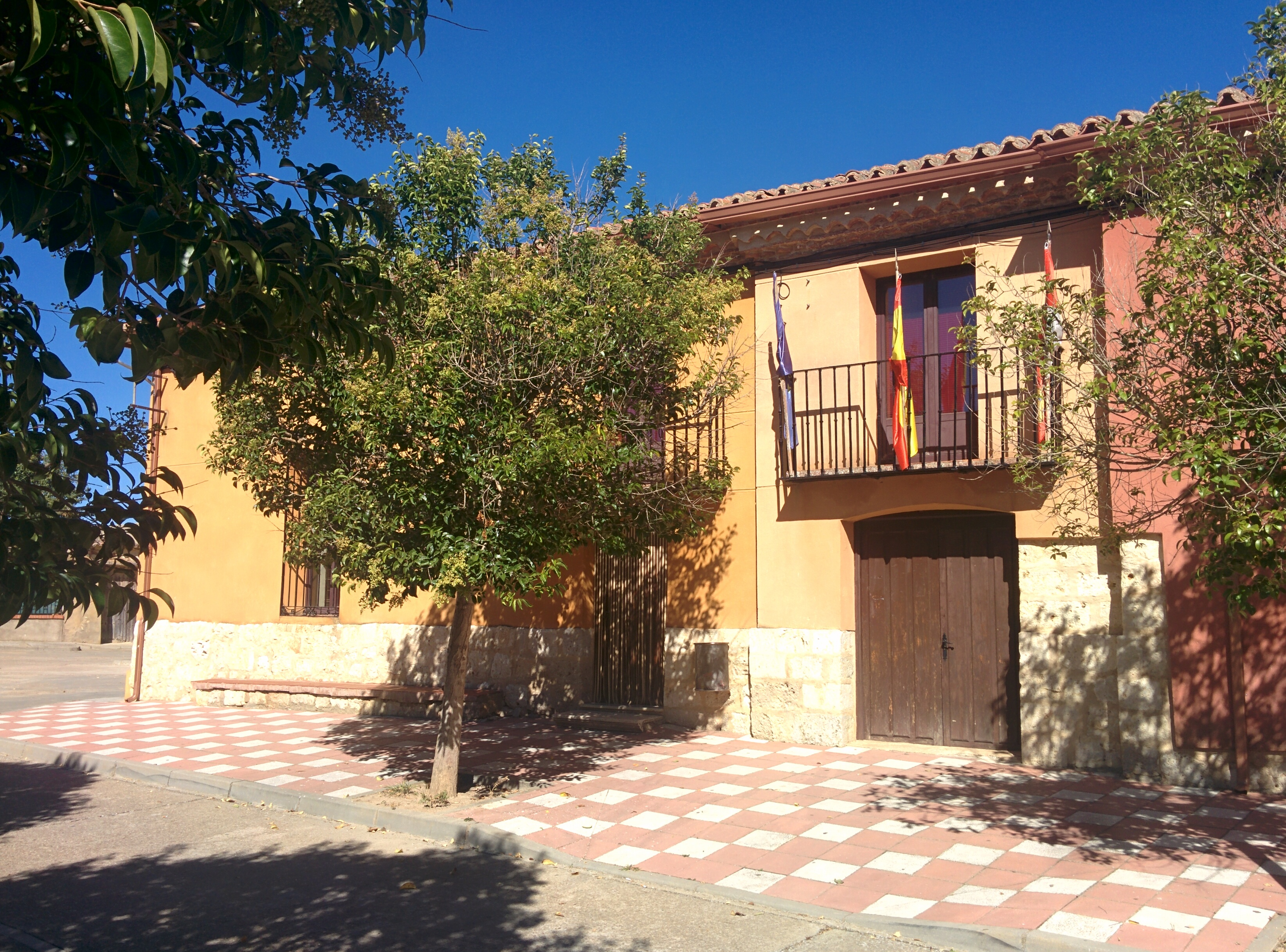 Casa consistorial de Villavellid (Valladolid, España).